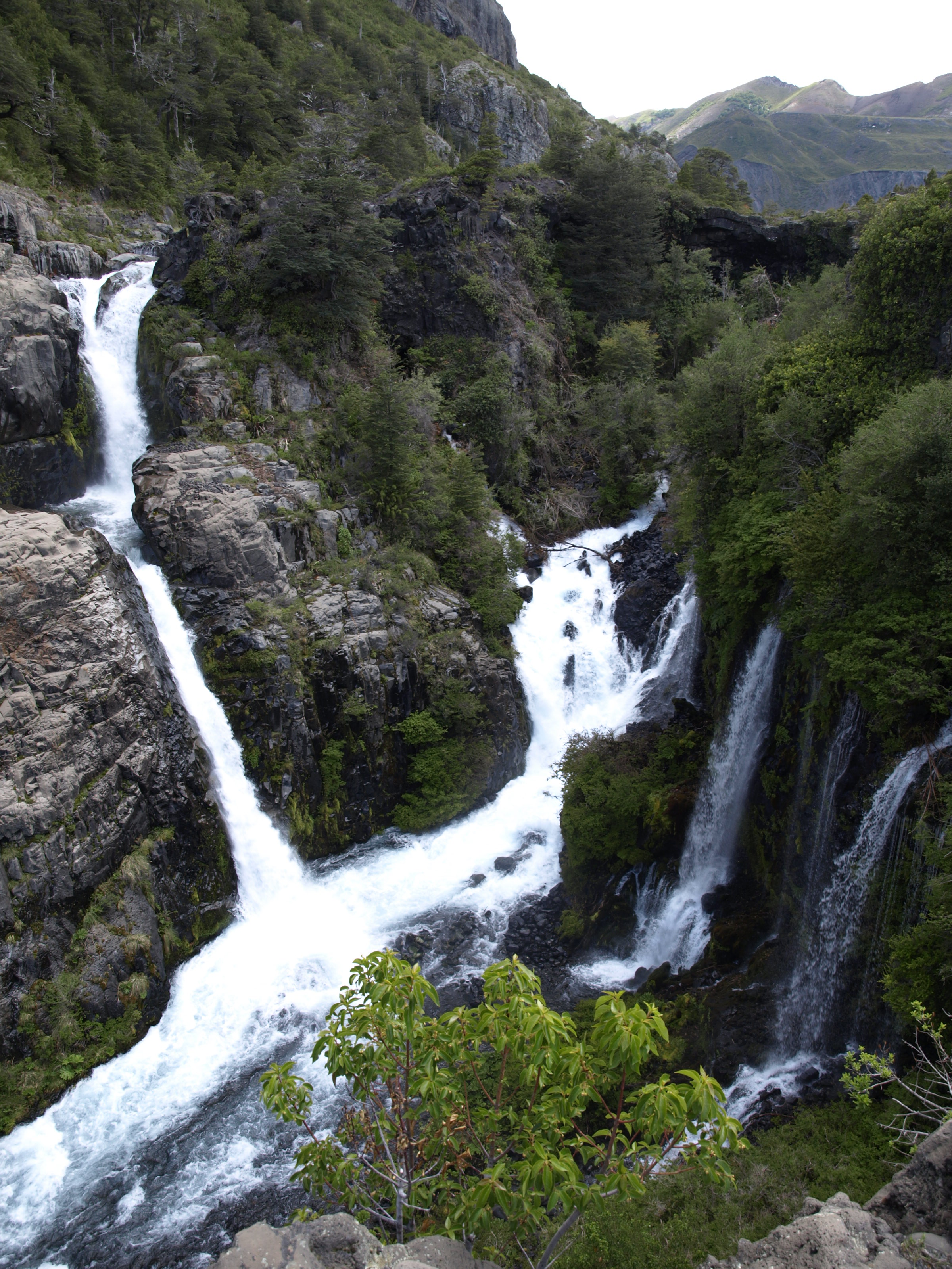 Parque Nacional Laguna del Laja, Chile.